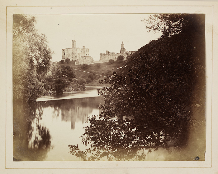 Teitl Cymraeg/Welsh title: Castell Warkworth, Northumberland Dyddiad/Date: 185- Cyfeiriad/Reference: crj00097 (PG2064/44) Rhif cofnod / Record no.: 3590900 Rhagor o wybodaeth am Ffotograffiaeth Gynnar Abertawe yn Llyfrgell Genedlaethol Cymru More information about Early Swansea Photography at the National Library of Wales